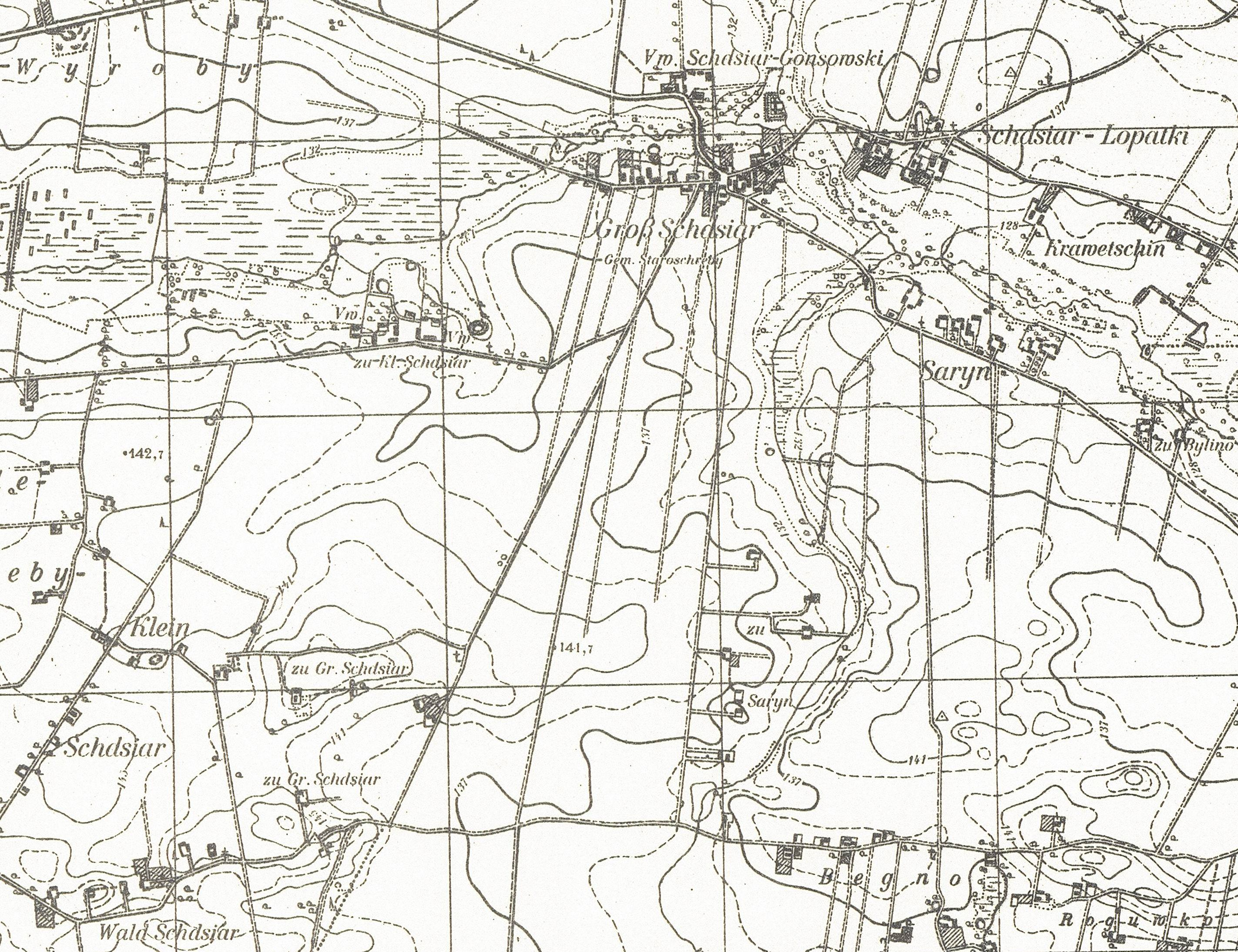 Zdziar Wielki i okolice na niemieckiej mapie topograficznej z 1944 r.